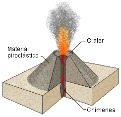 Autor: Usuario:Luis María Benítez